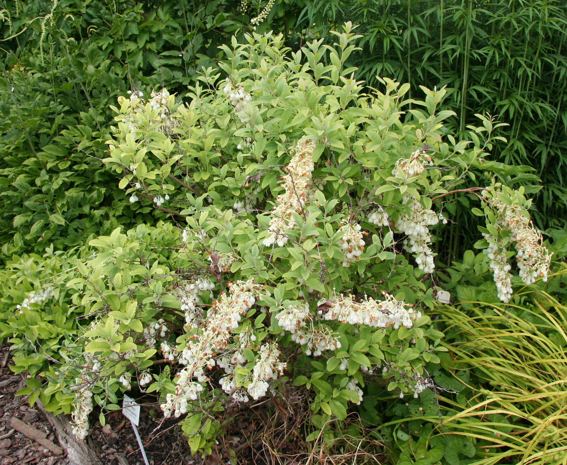 Zenobia pulverulenta im Botanischen Garten Dresden